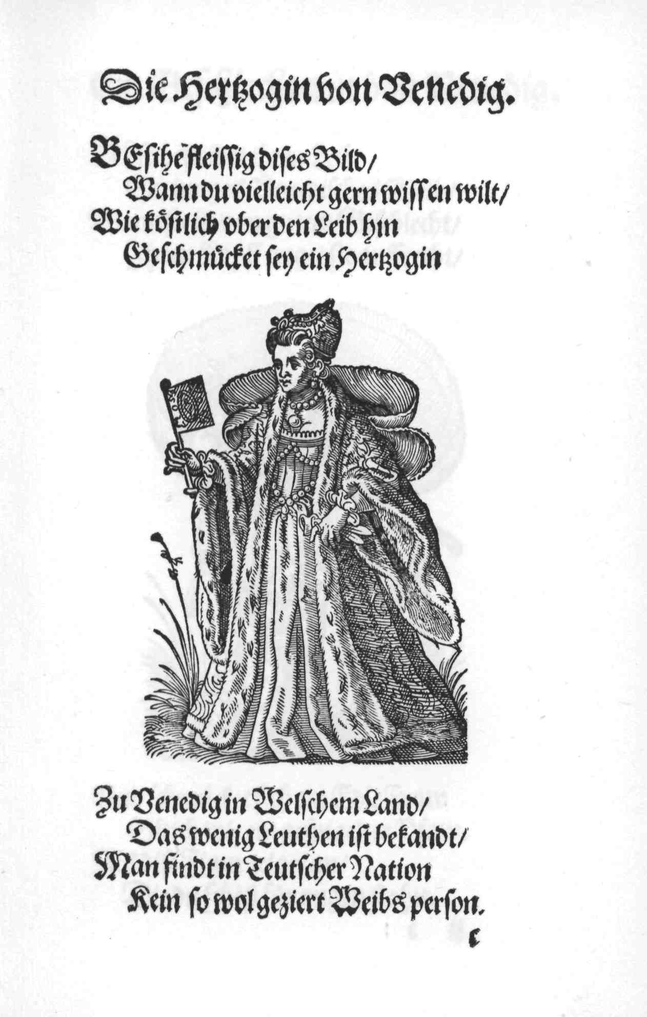 Die Hertzogin von Venedig. La dogaressa di Venezia, incisione da un libro del 1586Page from: Im Frauwenzimmer Wirt vermeldt von allerley schönen Kleidungen vnnd Trachten der Weiber (= Frauen-Trachtenbuch), Getruckt zu Franckfurt am Mayn in Verlegung Sigmund Feyrabends, 1586